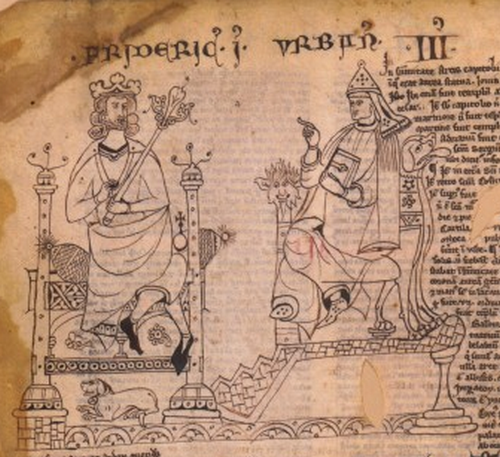 Hommage de Godefroy de Viterbe à Frédéric Ier et Urbain III